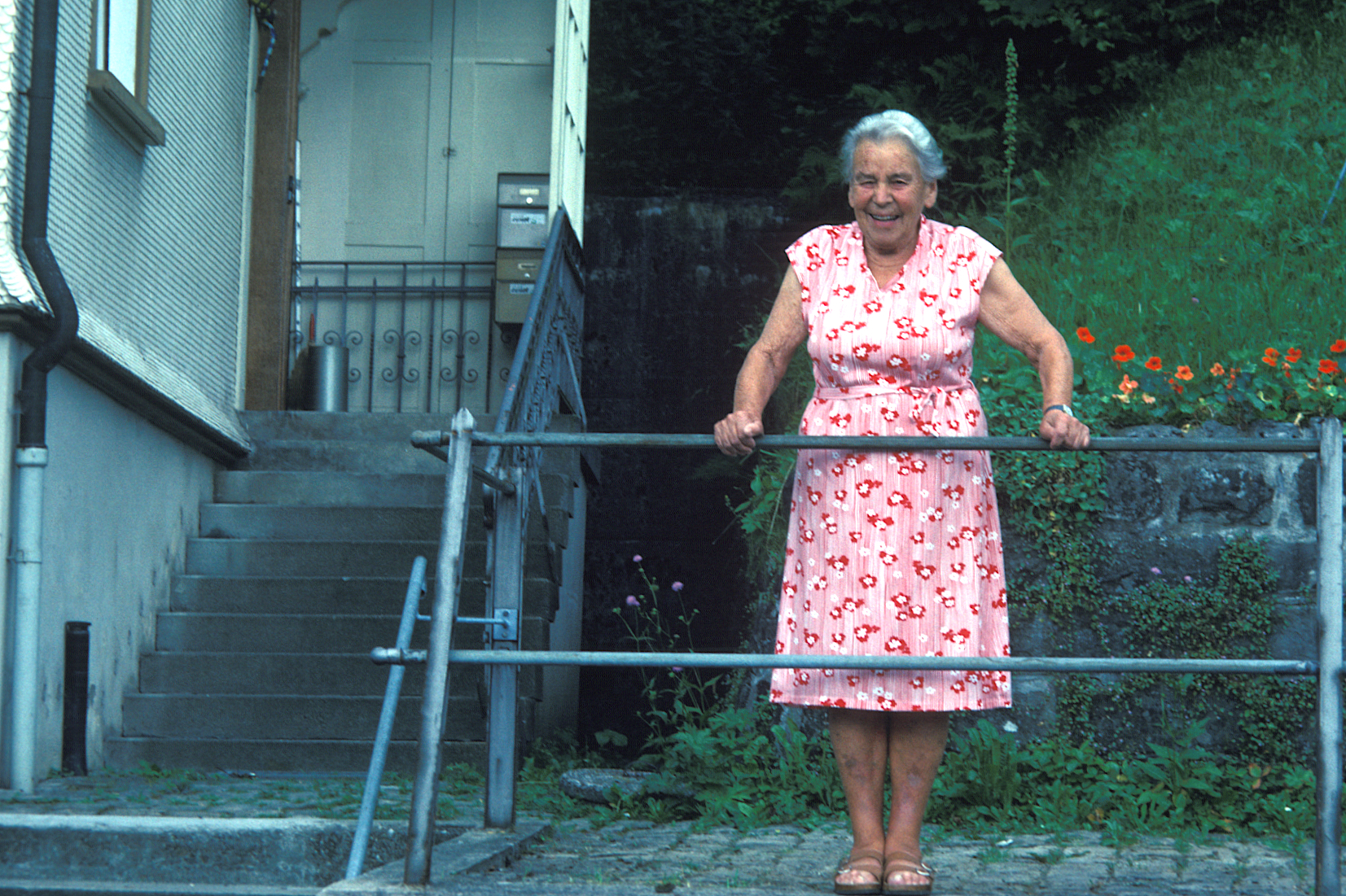 Elisabeth Pletscher vor ihrem Geburts- und Wohnhaus in Trogen, 1995